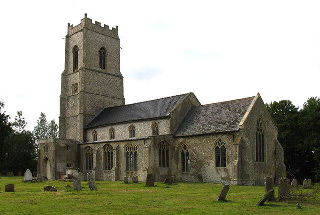 St Andrew, Wood Dalling, Norfolk